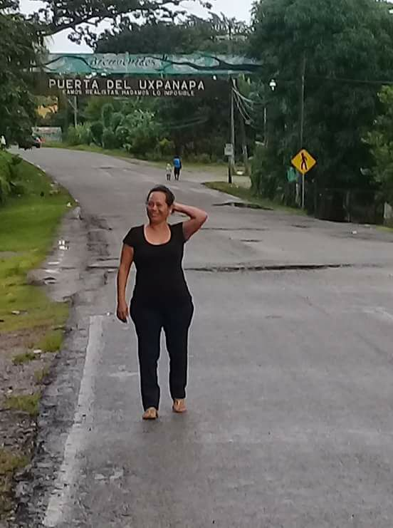 La puerta del Uxpanapa en Estacion Zarabia